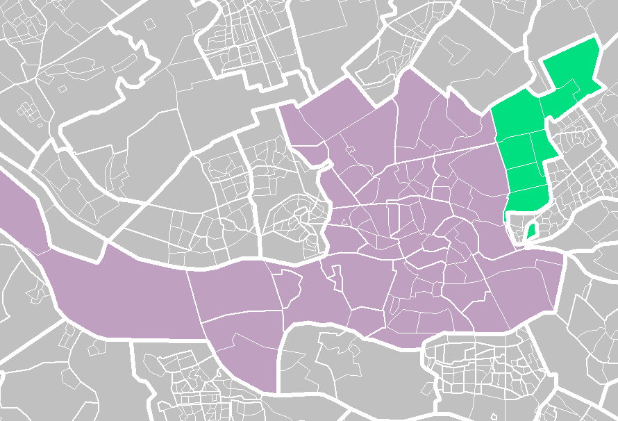 Rotterdam districts/neighboorhoods